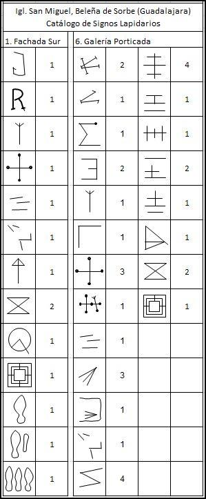 Iglesia de San Miguel, Beleña de Sorbe (Guadalajara, Castilla-La Mancha), España, románica, s XII. Catálogo de Signos lapidarios.